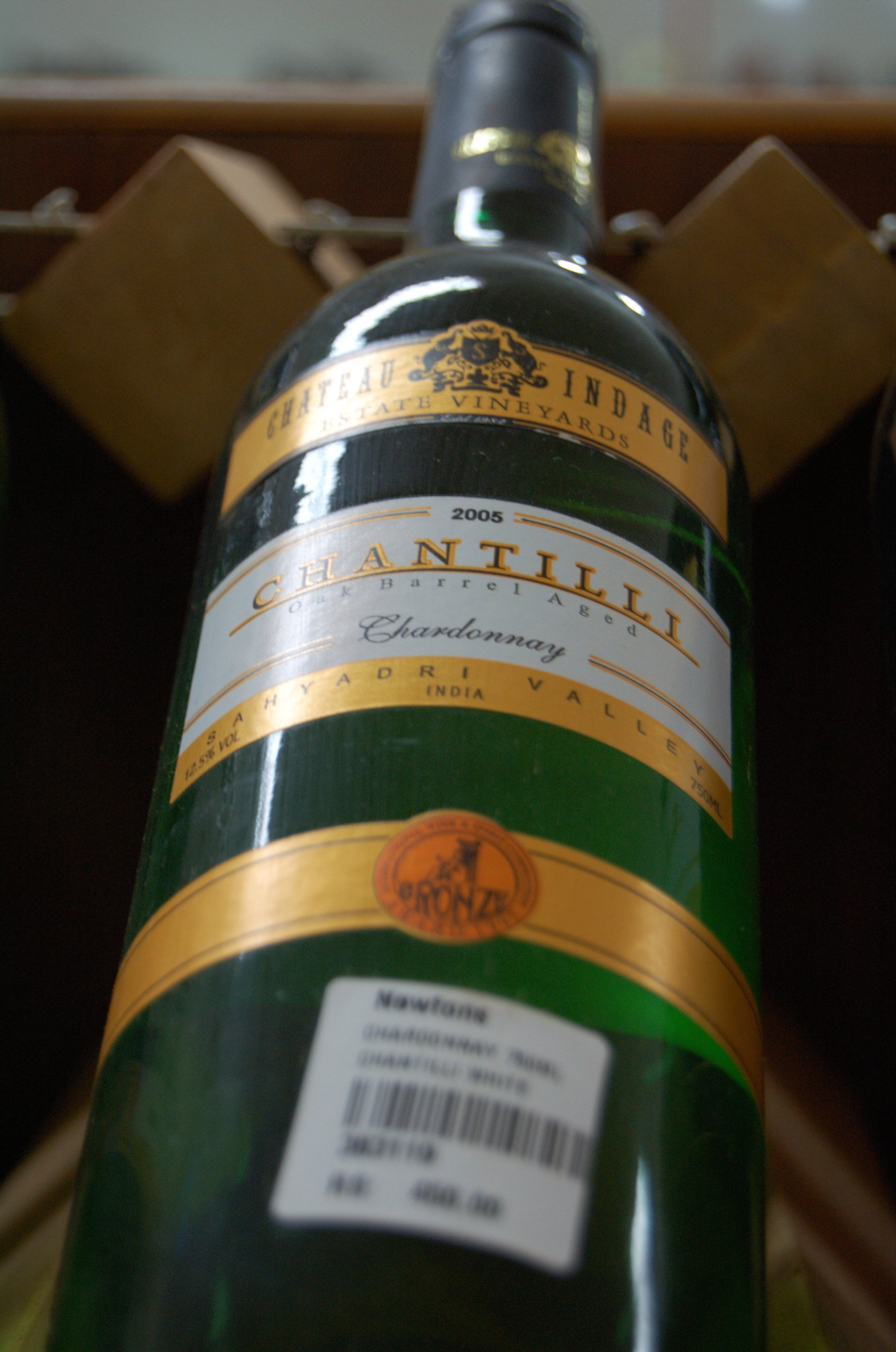 a local vintage